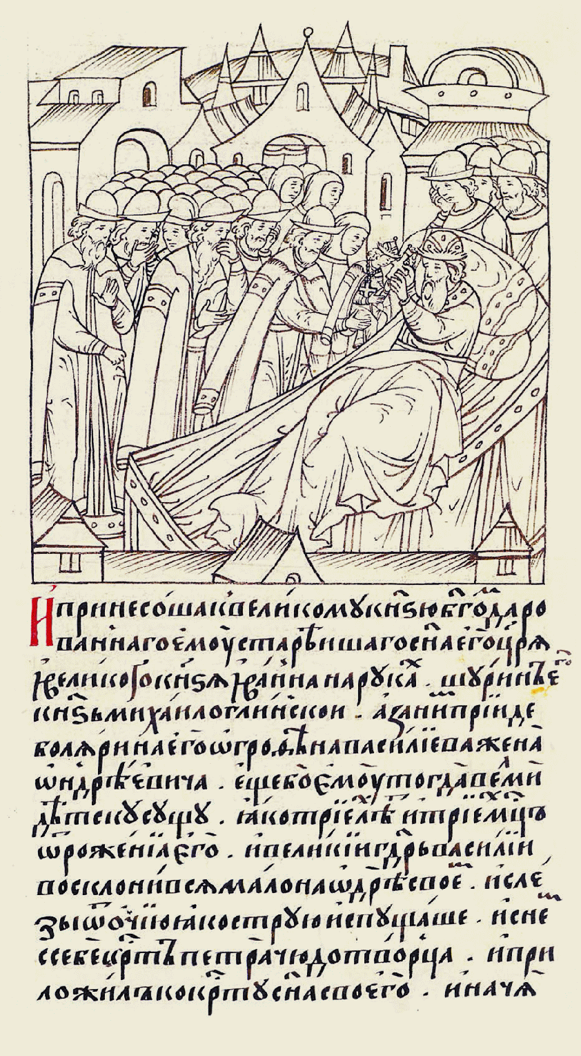 И принес к ве- ликому князю Богом даро- ванного ему старшего сына его, царя и вели- кого князя Ивана, на руках шурин его князь Михаил Глинский, а за ним пришла боярыня его Агрофена, жена Василия Андреевича; еще он тогда очень малым ребенком был, только трех лет и трех месяцев от рождения. И великий государь Василий склонился не- много на одре своем, и слезы из очей, как струю, испуская, снял с себя крест Петра чу- дотворца и приложил к кресту сына своего; и начал